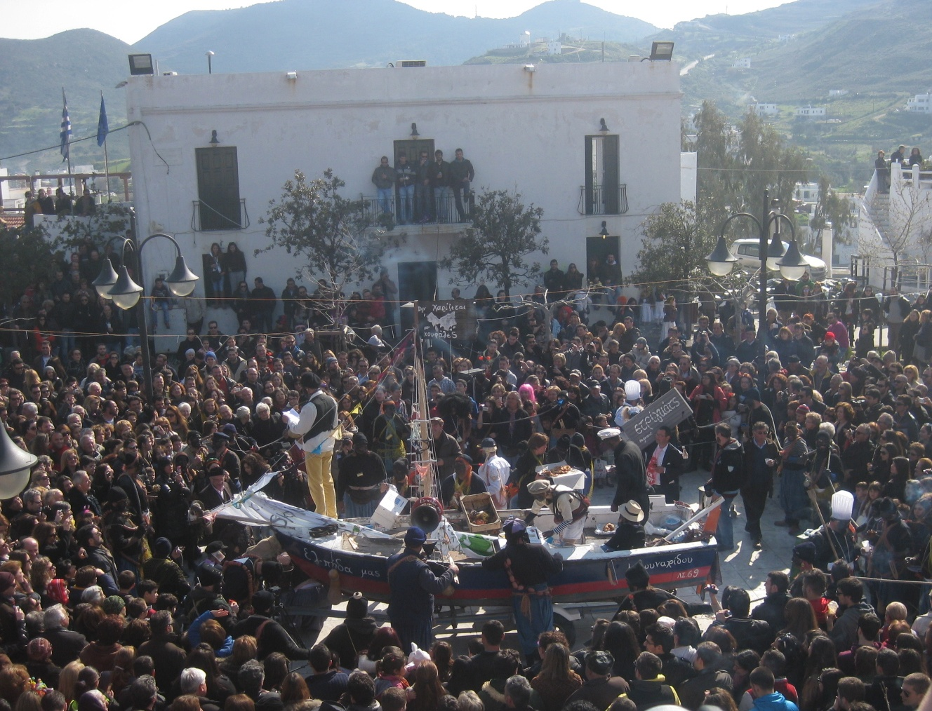 Le carnaval de Skyros sur la place centrale de la ville.